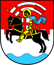 Wappen von Zadar, Kroatien